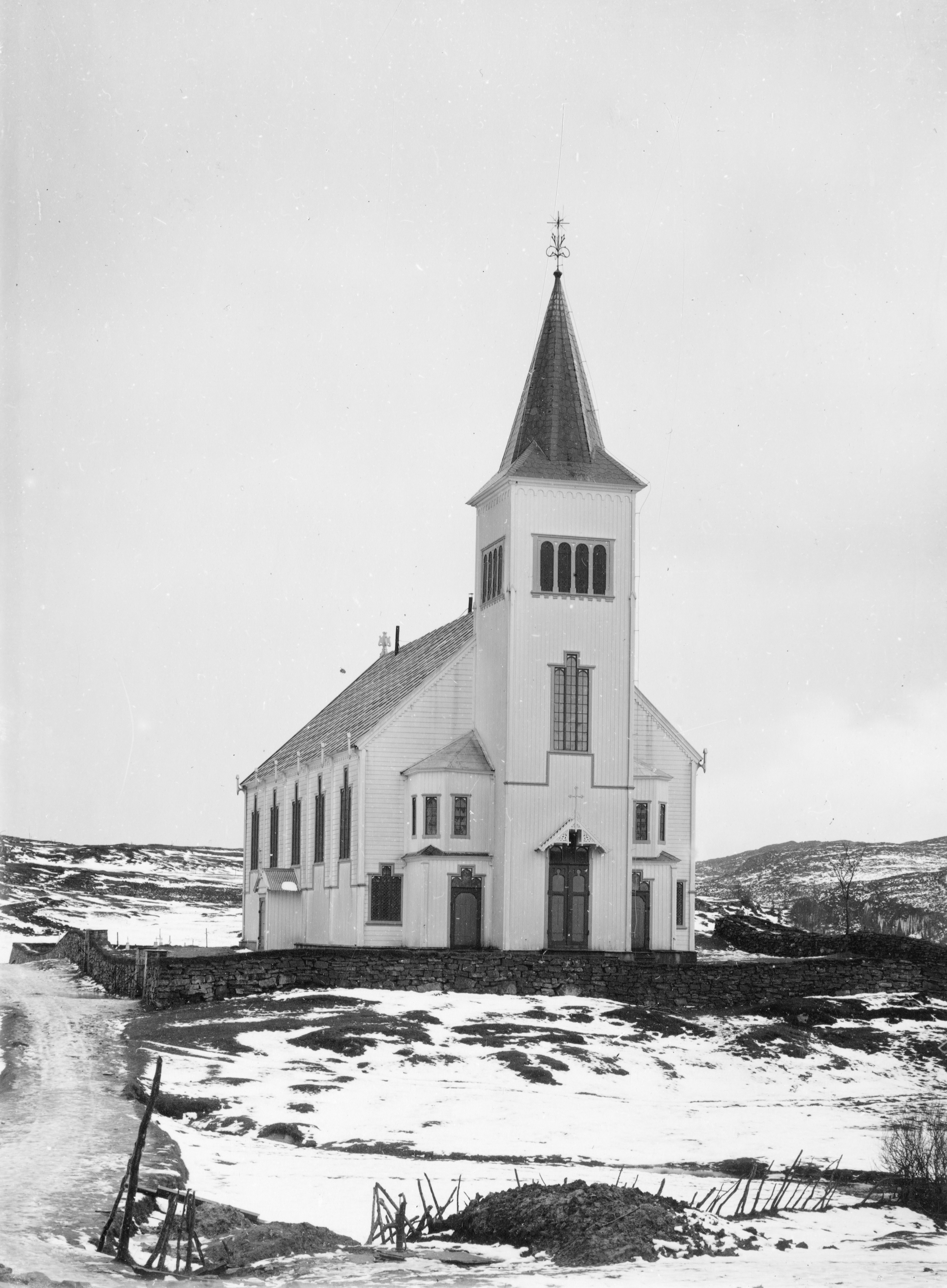 Fjell kirke i Fjell, Hordaland